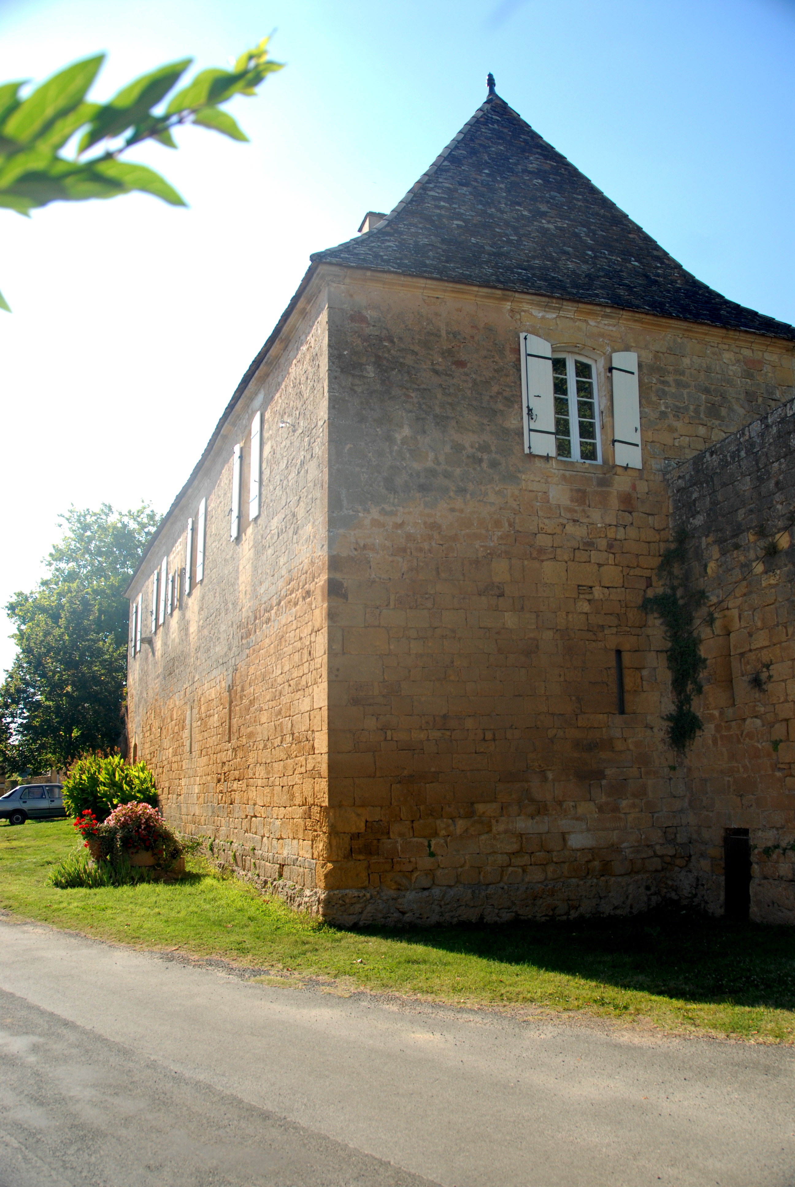 St.-Avit-Sénieur, Pfarrhaus, eine kleine Festung